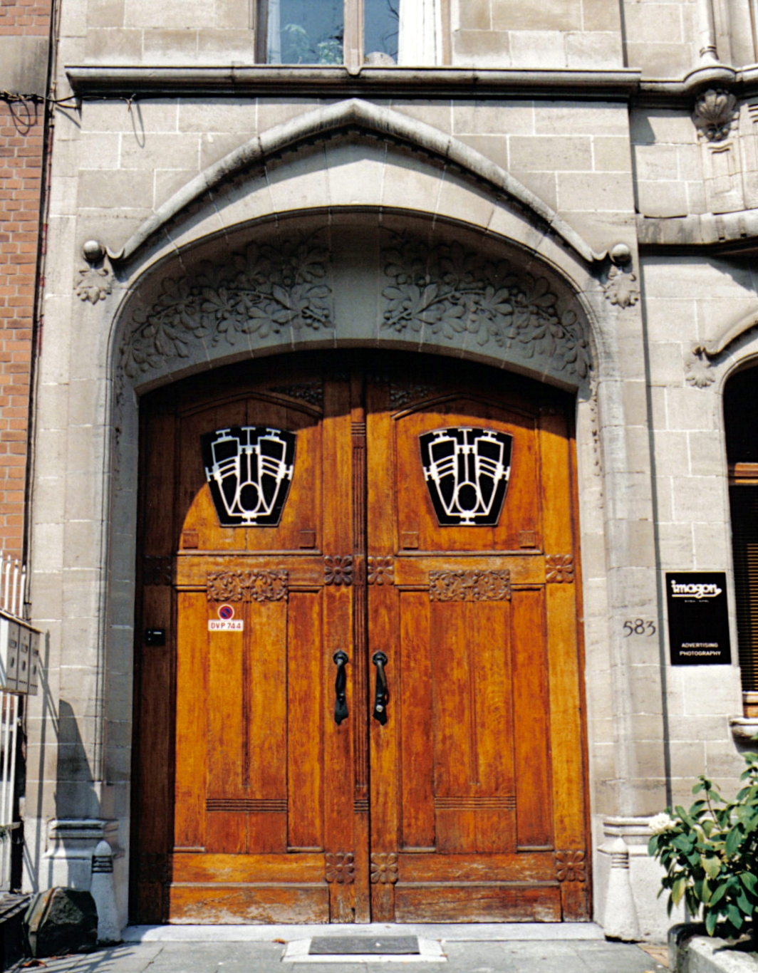 Alphonse Groothaert - Boulevard De Smet de Nayer n° 583-585 à Bruxelles (Art nouveau)